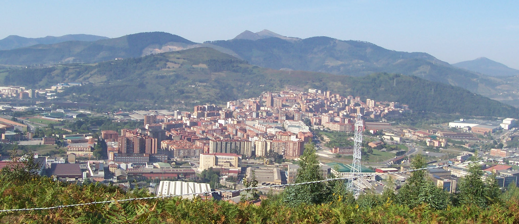 Modificación (recorte) de la original. Nombre original: Basauri desde el cielo